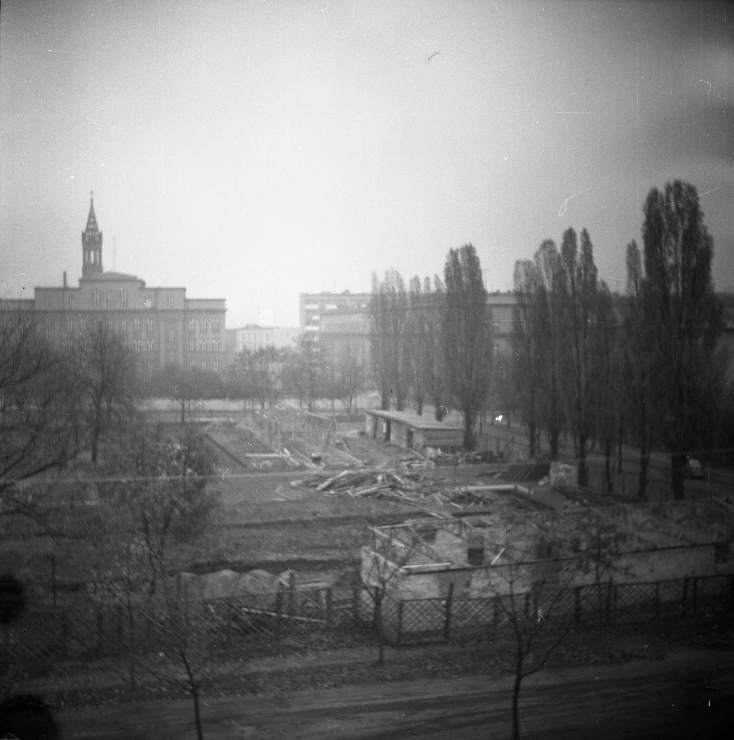 Poznań - widok na budowaną przychodnię przy ul. Bogusławskiego, liceum nr. VIII i wieżę Kościoła pw. Matki Boskiej Bolesnej, 1964 rok.